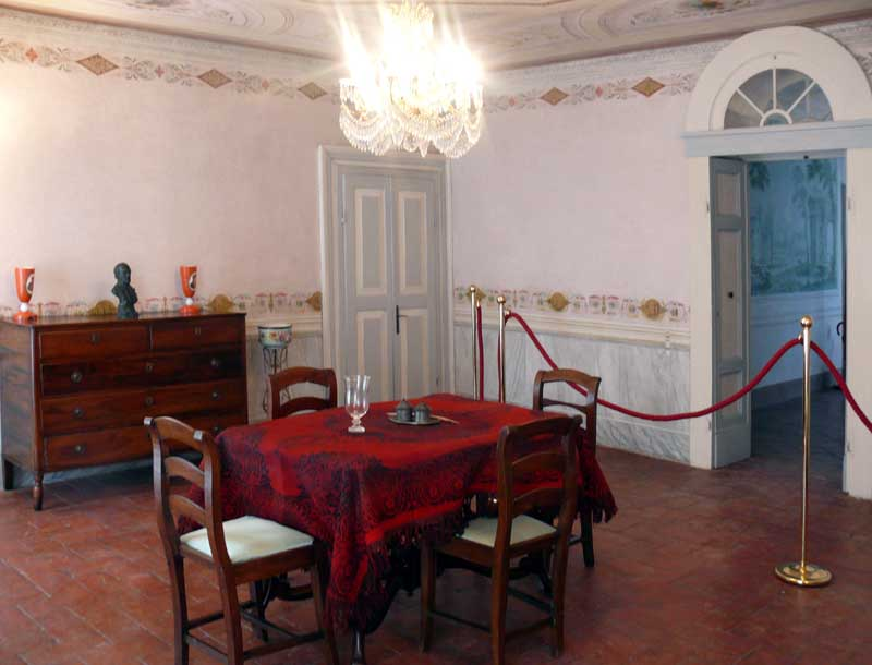 sala del trattato della pace di Villafranca di Verona - 1859